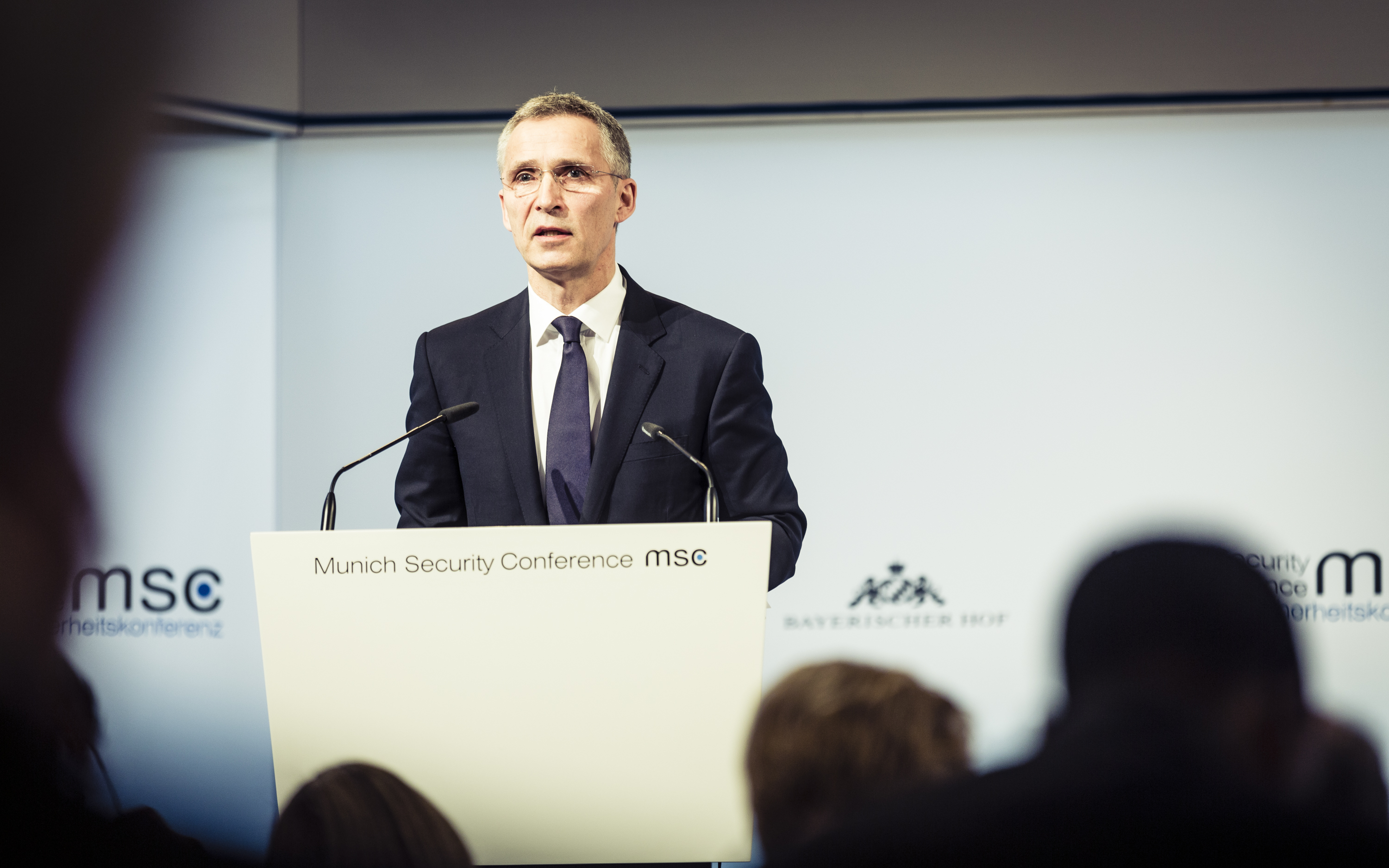 Jens Stoltenberg während der Sicherheitskonferenz 2017